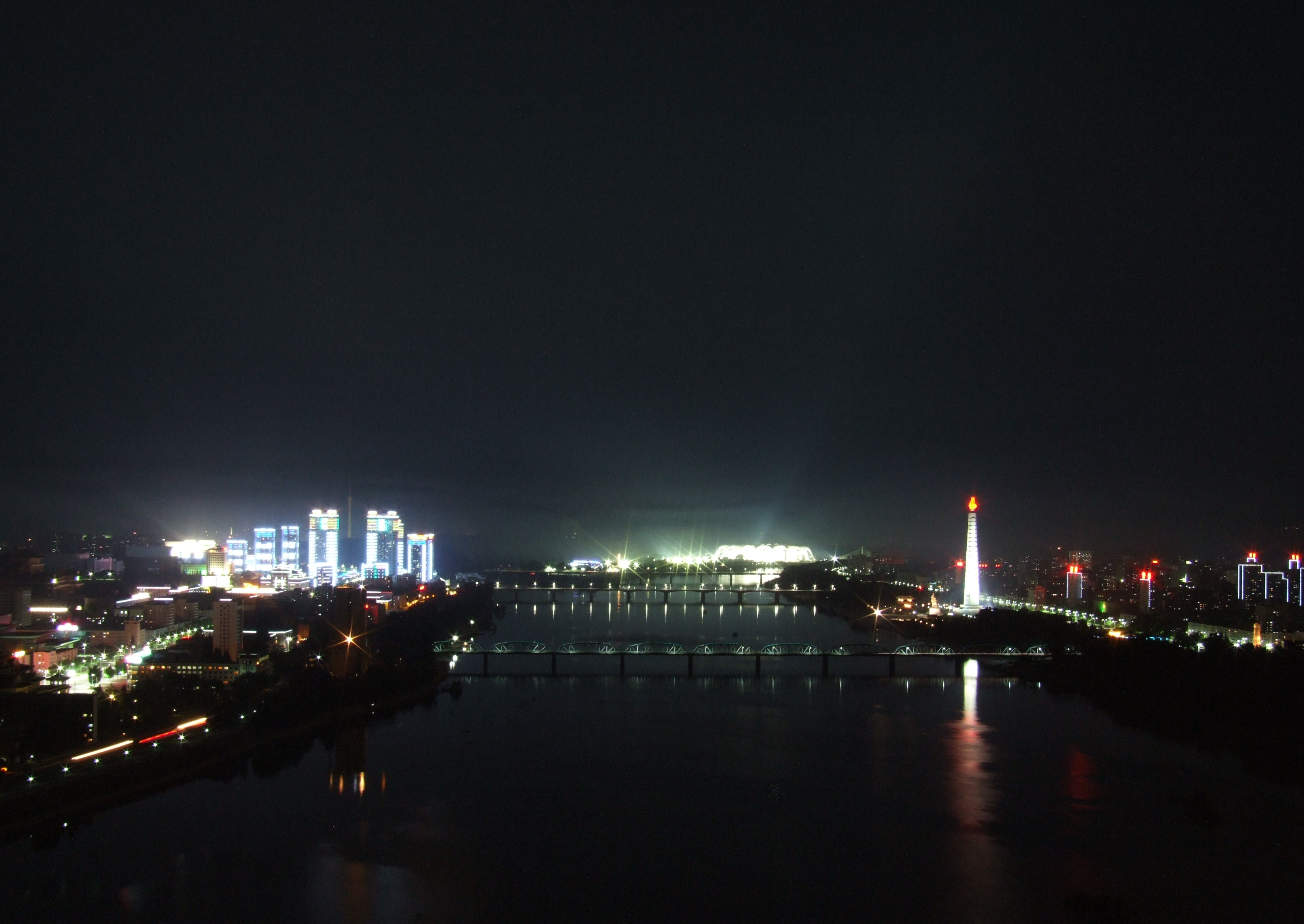 Pjöngjang bei Nacht